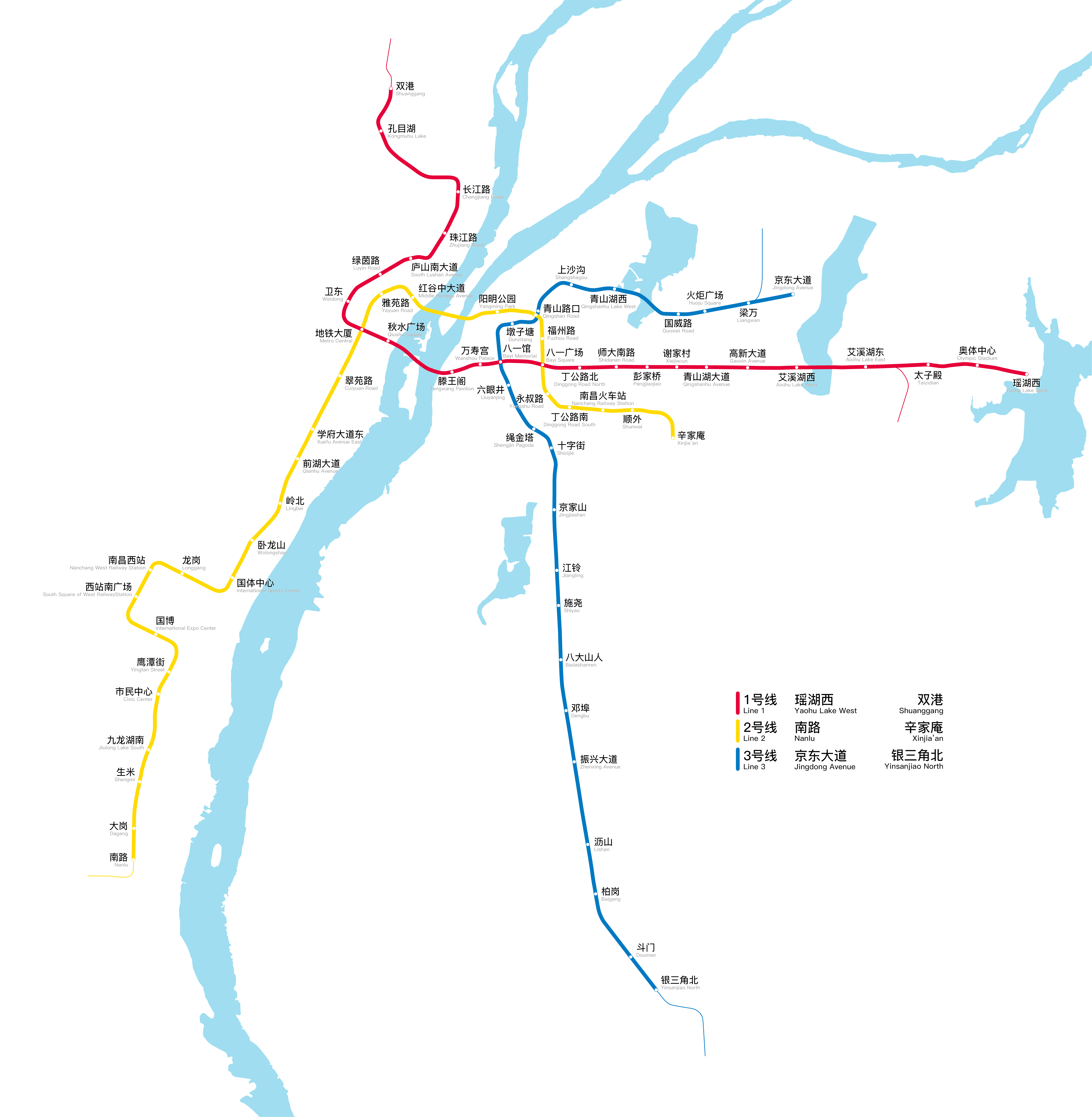 中文（中国大陆）: 南昌地铁运营线路图